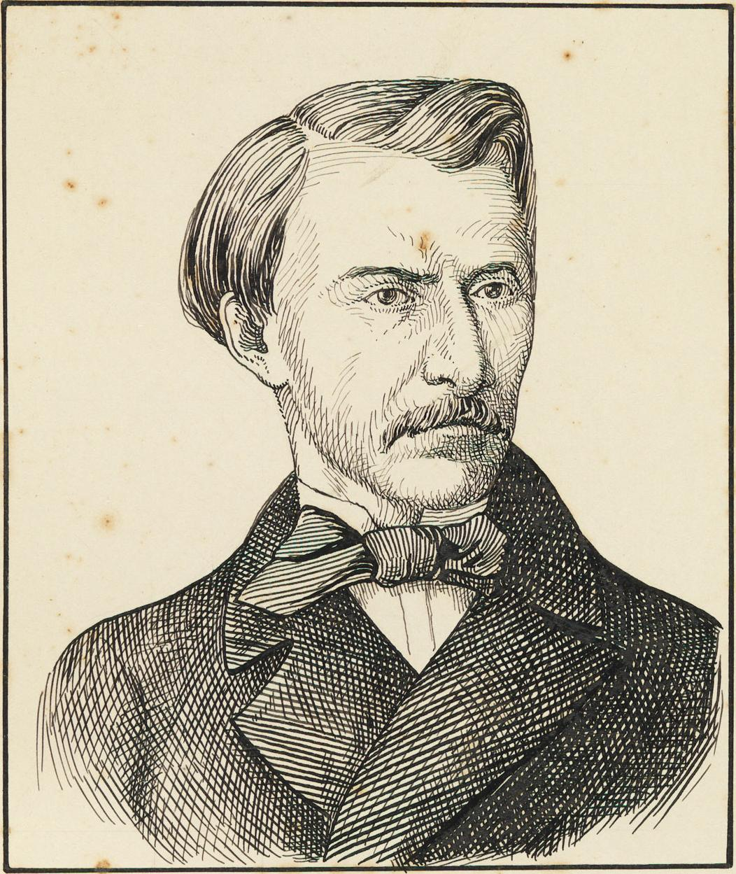 Gonçalves de Magalhães, Visconde de Araguaya.